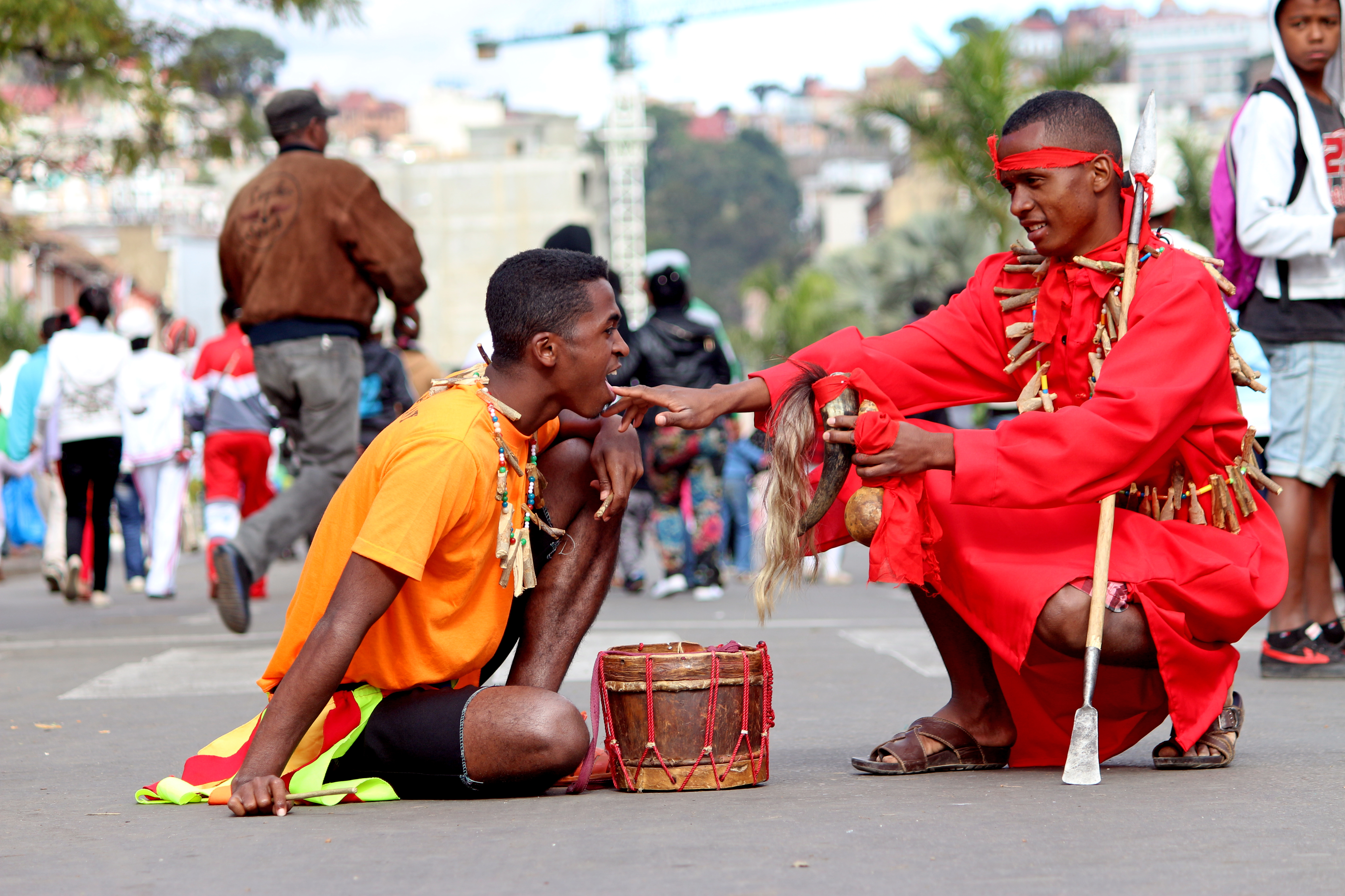 les baralahy ont leur grand sorcier (ombiasy) dans chaque village, qui peuvent leurt donner des pouvoir surnaturelles ou leur guerire.